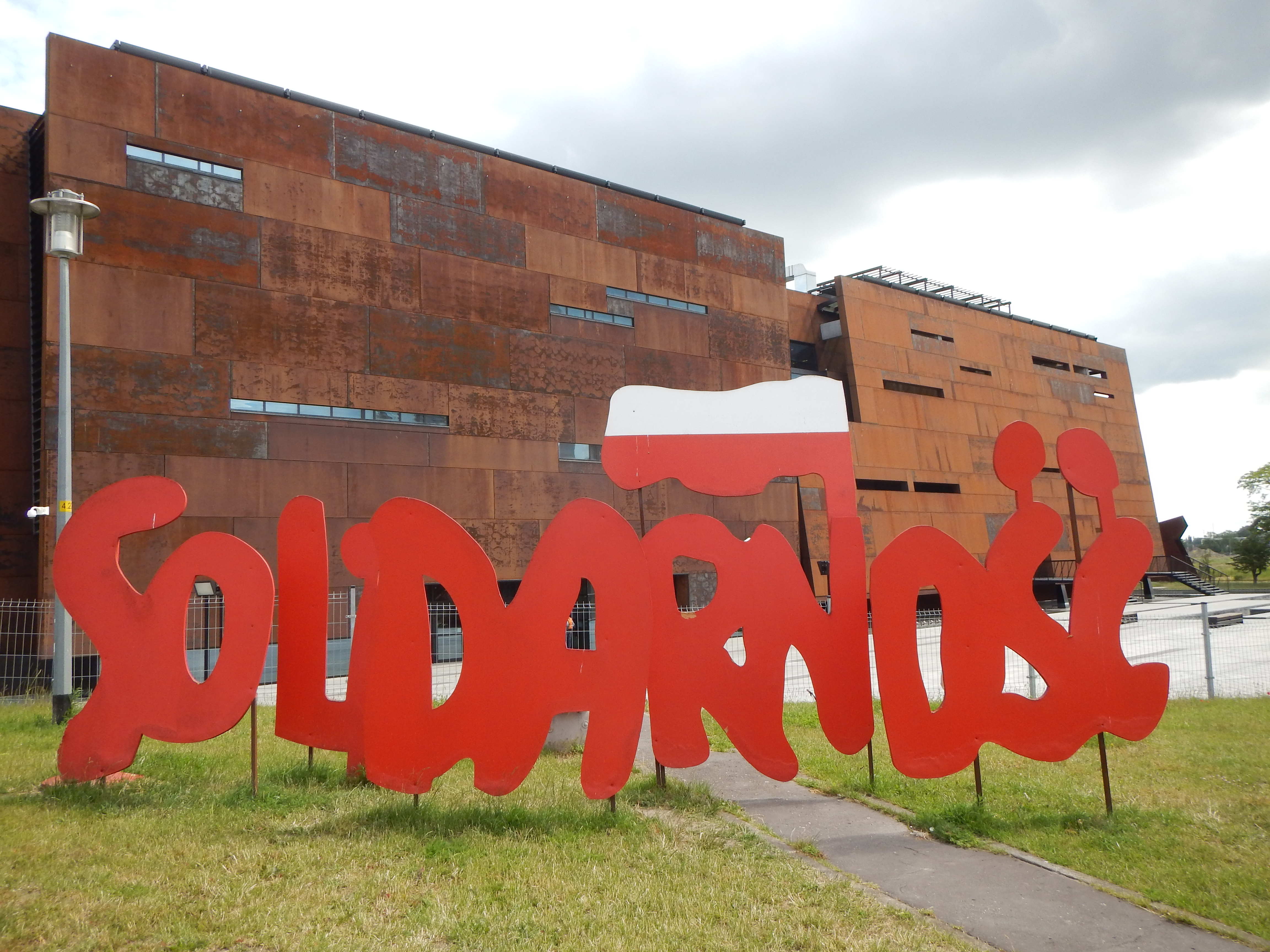 Zdjęcia wykonane podczas zjazdu Koalicji Otwartej Edukacji w Gdańsku 29 czerwca w Europejskim Centrum Solodarności